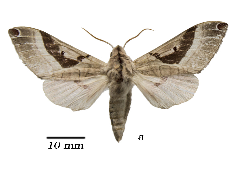 Ceridia heuglini (Ethiopia) (SMCR) male upperside